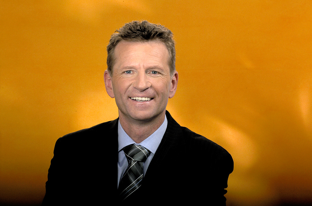 Günther Felbinger (* 1962), Mitglied des bayerischen Landtags